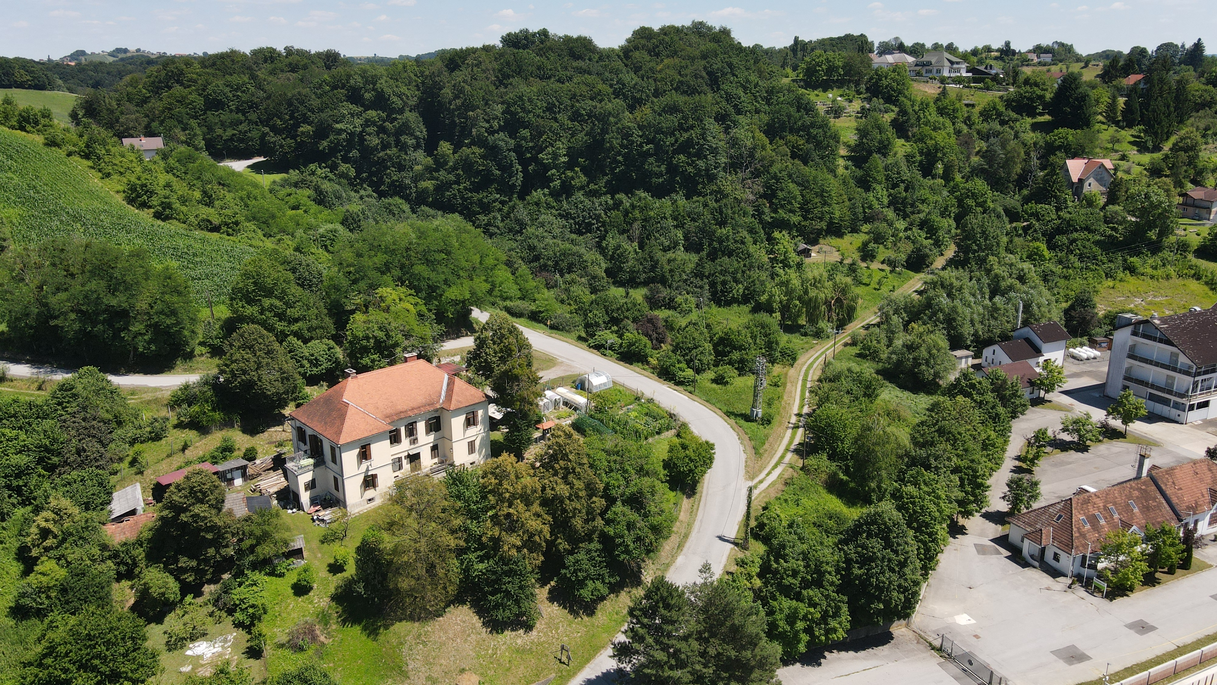 Felberjeva vila - Pesnica pri Mariboru